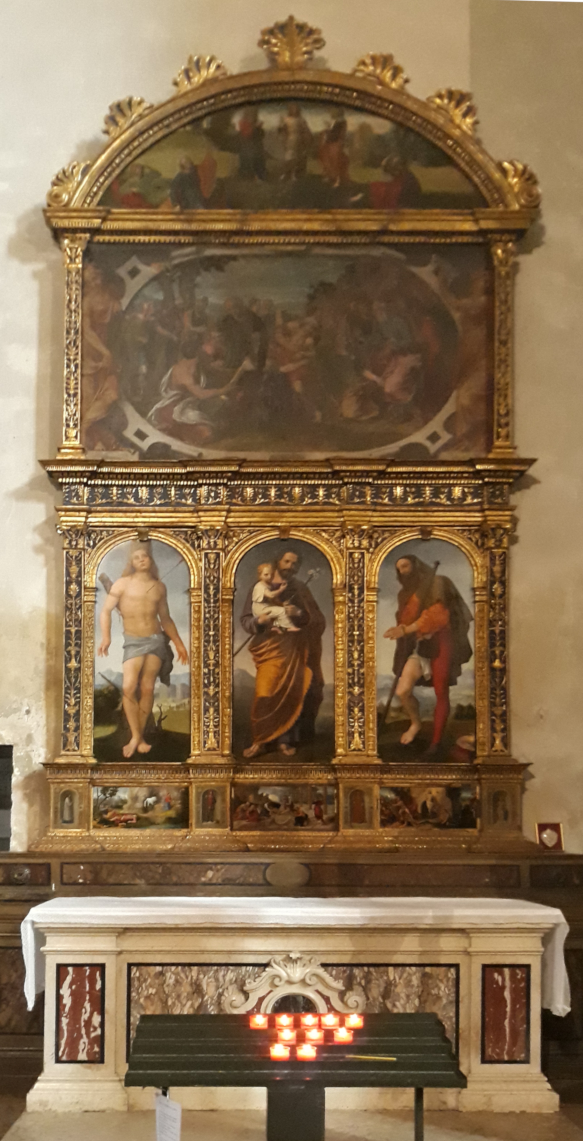 Altare laterale della chiesa di San Giorgio in Braida a Verona. Polittico ad opera di Giovan Francesco Caroto (dipinti di sinistra, San Sebastiano, di destra, San Rocco e pradella), di Recchia (dipinto centrale) e Felice Brusasorci